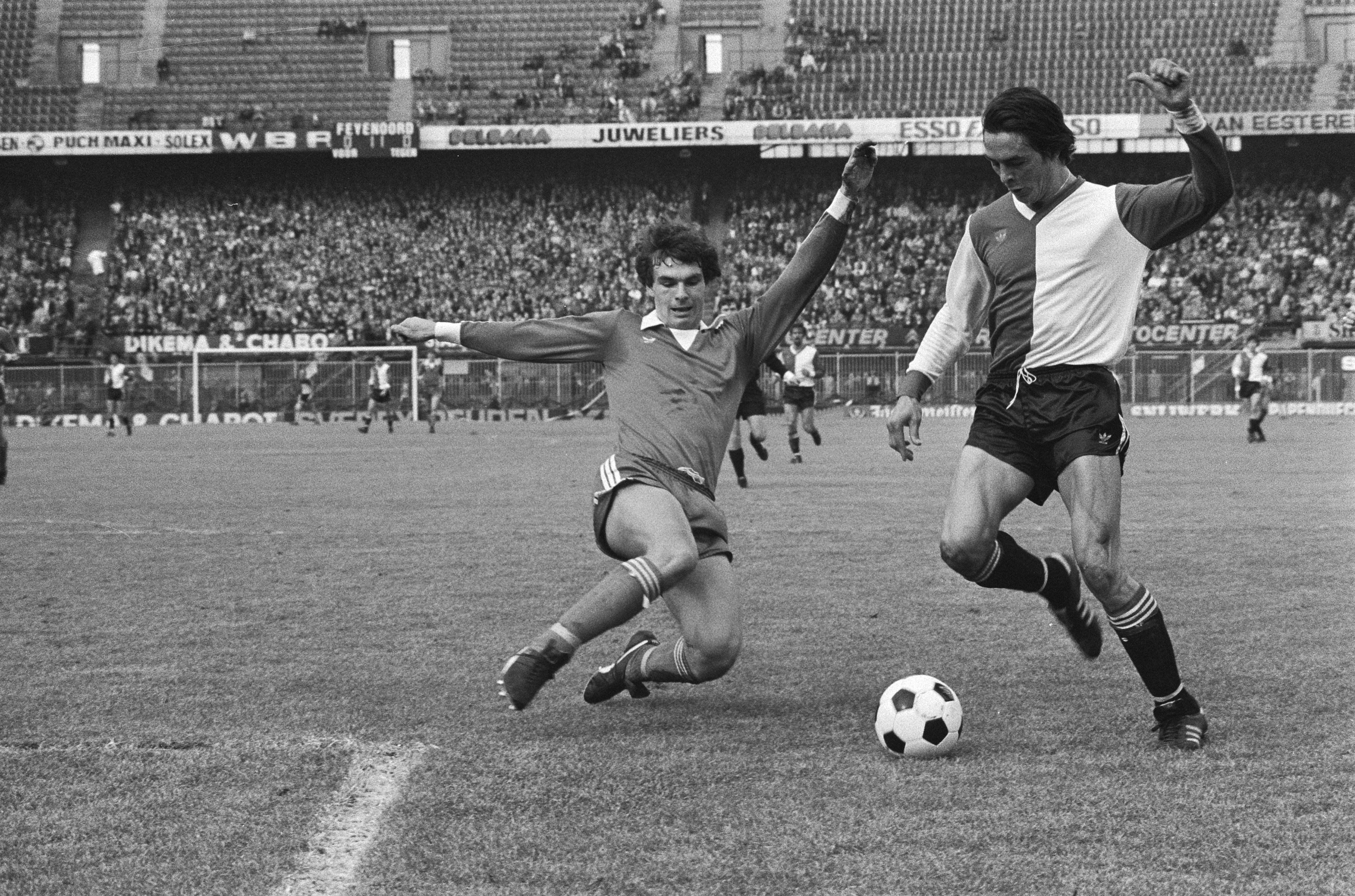 Collectie / Archief : Fotocollectie Anefo Reportage / Serie : Feijenoord tegen Sparta 4-1 Beschrijving : Jan Peters (rechts) van Feijenoord passeert Luuk Balkestein Datum : 4 maart 1979 Locatie : Rotterdam, Zuid-Holland Trefwoorden : sport, voetbal Persoonsnaam : Balkestein, Luuk, Peters, Jan Fotograaf : Suyk, Koen / Anefo Auteursrechthebbende : Nationaal Archief Materiaalsoort : Negatief (zwart/wit) Nummer archiefinventaris : bekijk toegang 2.24.01.05 Bestanddeelnummer : 930-1483